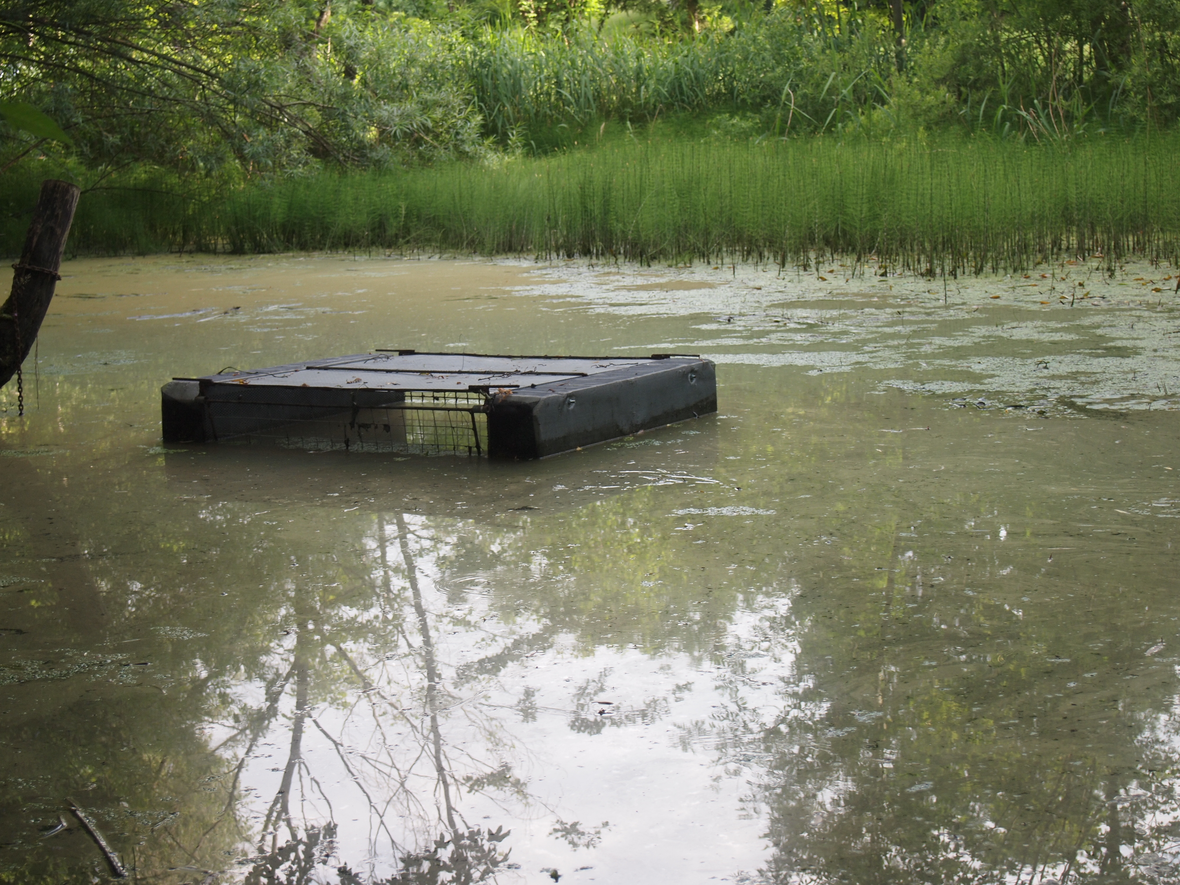 Weiher am Forstanger am westlichen Rand von Markt Irsee, Bayern. im Juni 2014 vermuteter Aufenthaltsort einer Mitte 2013 im Oggenrieder Weiher vermuteten Schnappschildkröte (Lotti). Anders als in der Presse dargestellt handelt es sich nicht um den Klosterweiher, sondern um einen vermutlich erst nach 1807 als Fisch- oder Löschweiher angelegten Teich, der von Quellen im drainierten westlichen Hang gespeist wird und heute stark eutroph und im Verlanden begriffen ist. In der Bildmitte im Wasser ist eine von der Gemeinde aufgestellte Schildkrötenfalle zu sehen.